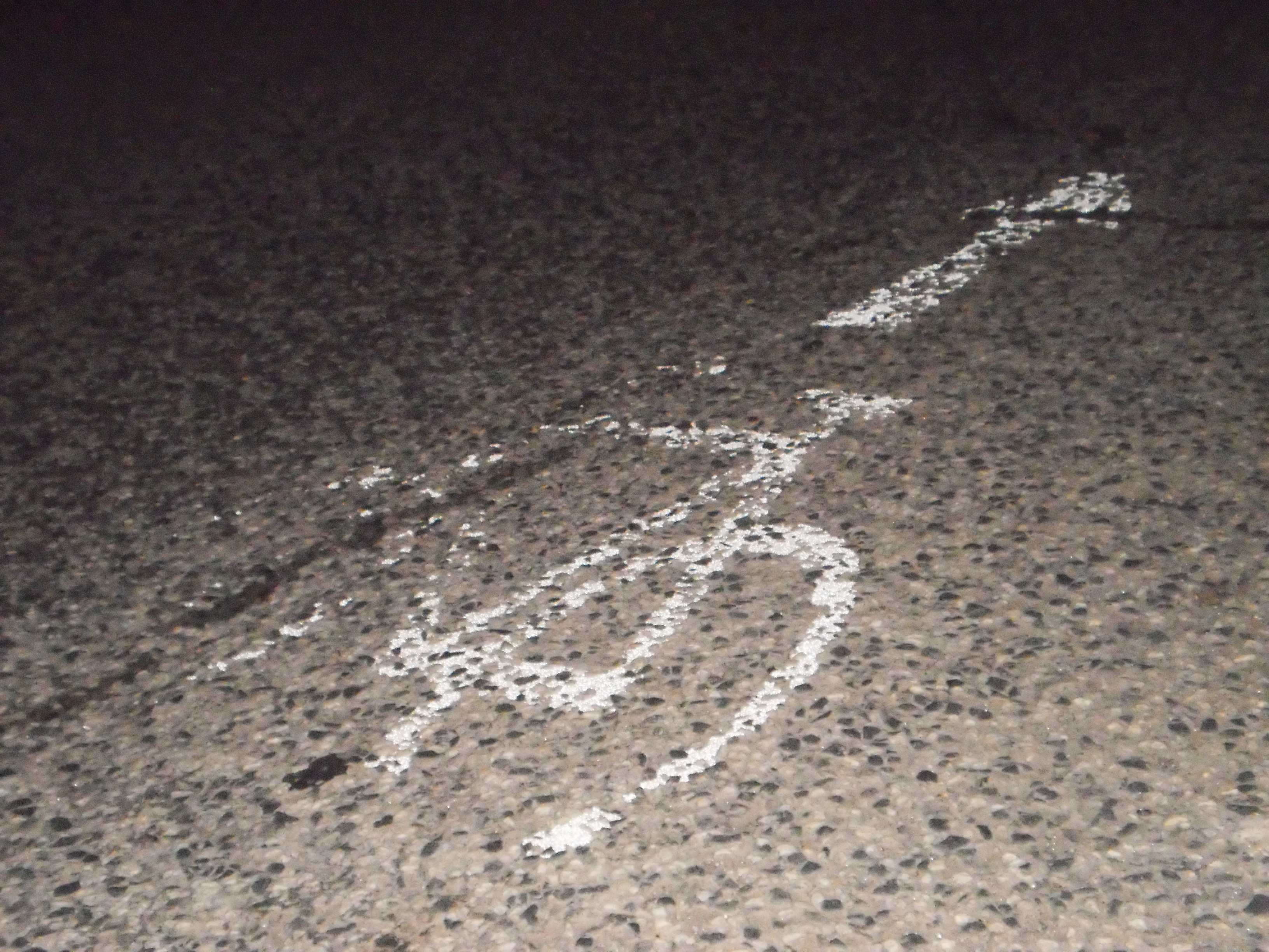 Inzwischen (2016) abgefahrenes Piktogramm zur Ermutigung zum Fahrradfahren auf der Strasse. In Fahrtrichtung ist eine früher stark befahrene Hauptverkehrsstrasse (Pilgrimstein) für KFZ in Einbahnrichtung eingerichtet, die nach und nach für den Radverkehr in Gegenrichtung geöffnet wurde, zeitweise mit einem Radweg auf dem links daneben liegenden Bürgersteig. Dieser wegen der Enge in Marburgs Innenstadt und jahrzehntelanger autogerechter Verkehrsplanung zu schmale Bordsteinradweg führte immer wieder zu Konflikten mit Fussgängern, besonders wenn auch in Einbahnrichtung auf den dafür nicht vorgesehenen Radweg ausgewichen wurde. Derzeit ist allerdings diese Wegeverbindung entlang des Alten Botanischen Gartens wegen Sanierungsarbeiten für Fussgänger und Radler gespert, eine Umleitung eingerichtet.